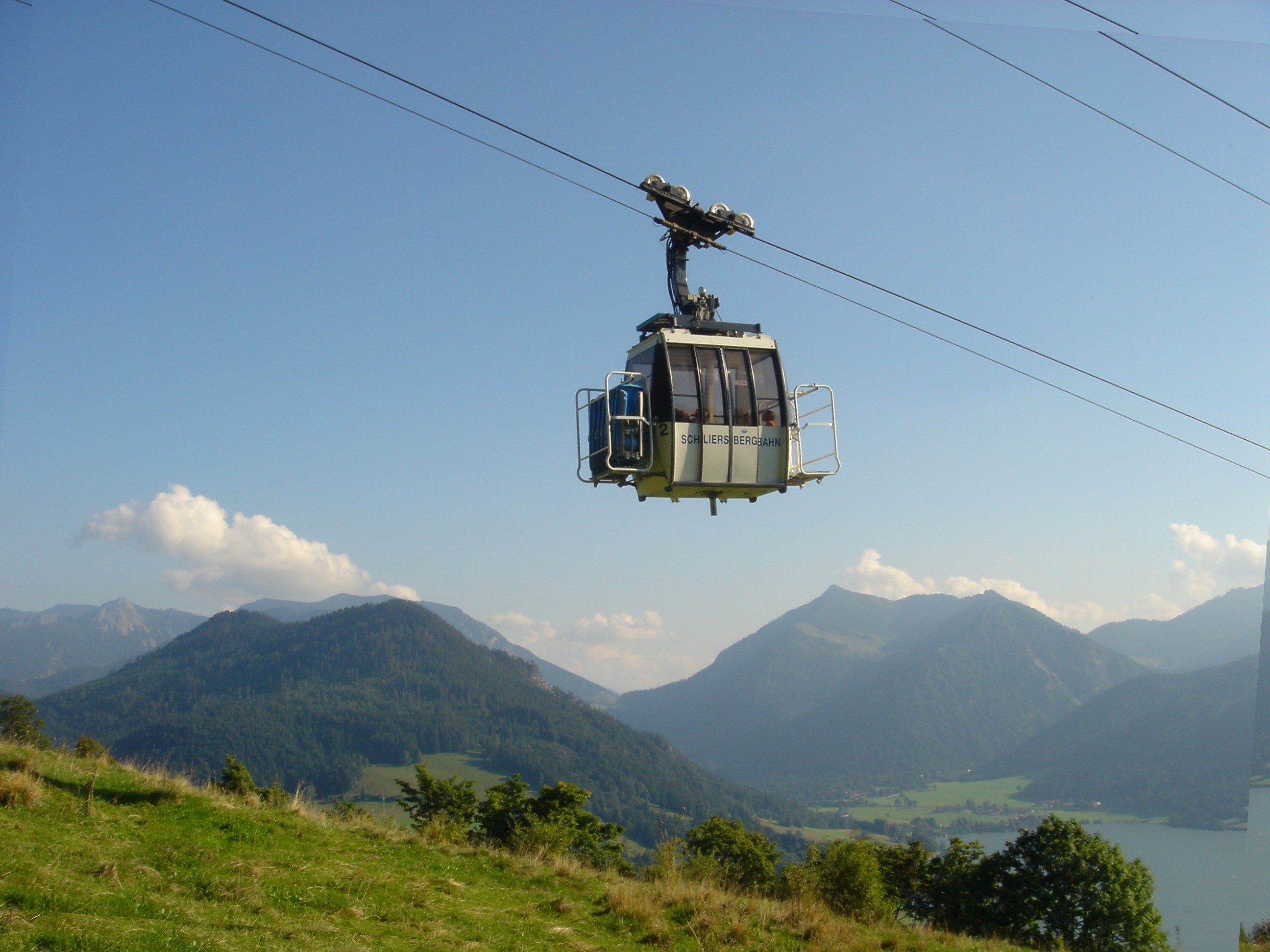 Bild von Der Seilbahn auf die Schliersbergalm